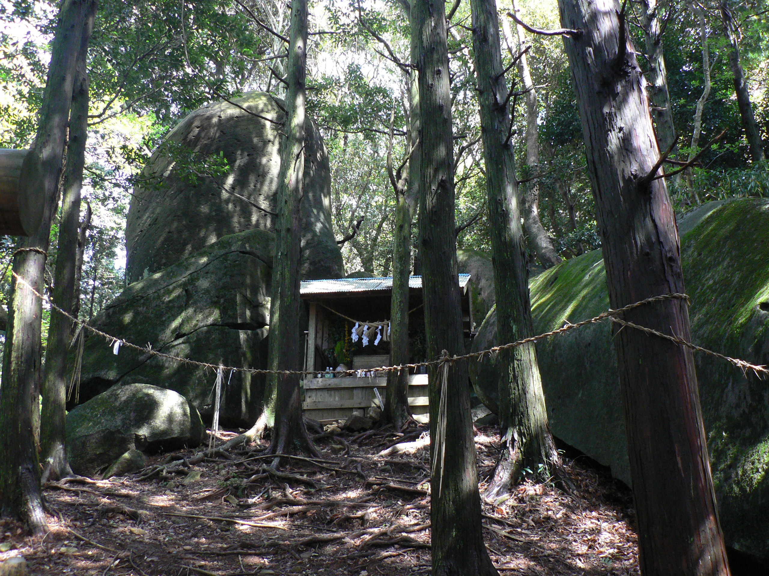 熊本県の拝ケ石巨石群の写真。2012年4月撮影。